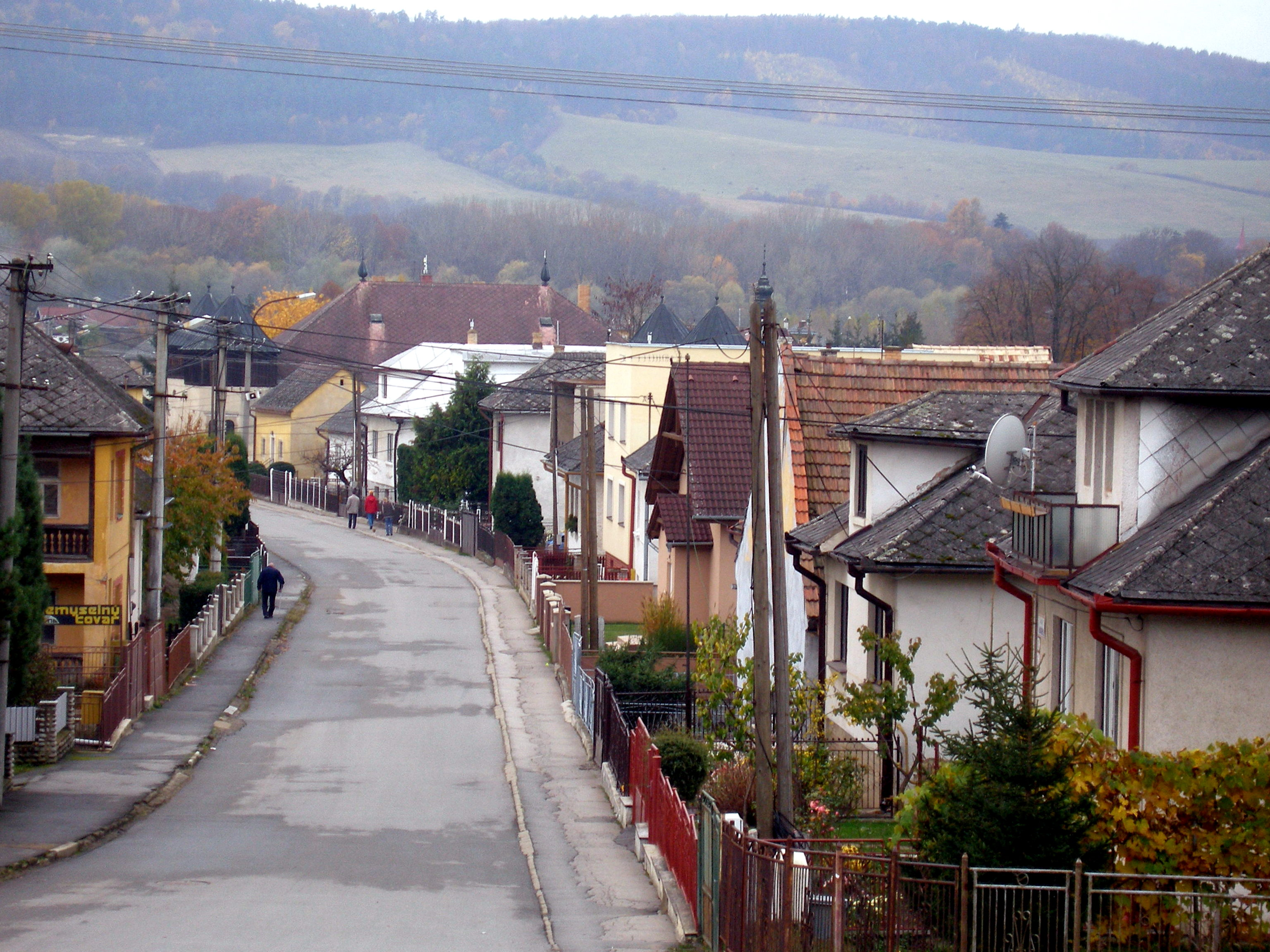 Obec Šarišské Michaľany, okres Sabinov, región Šariš